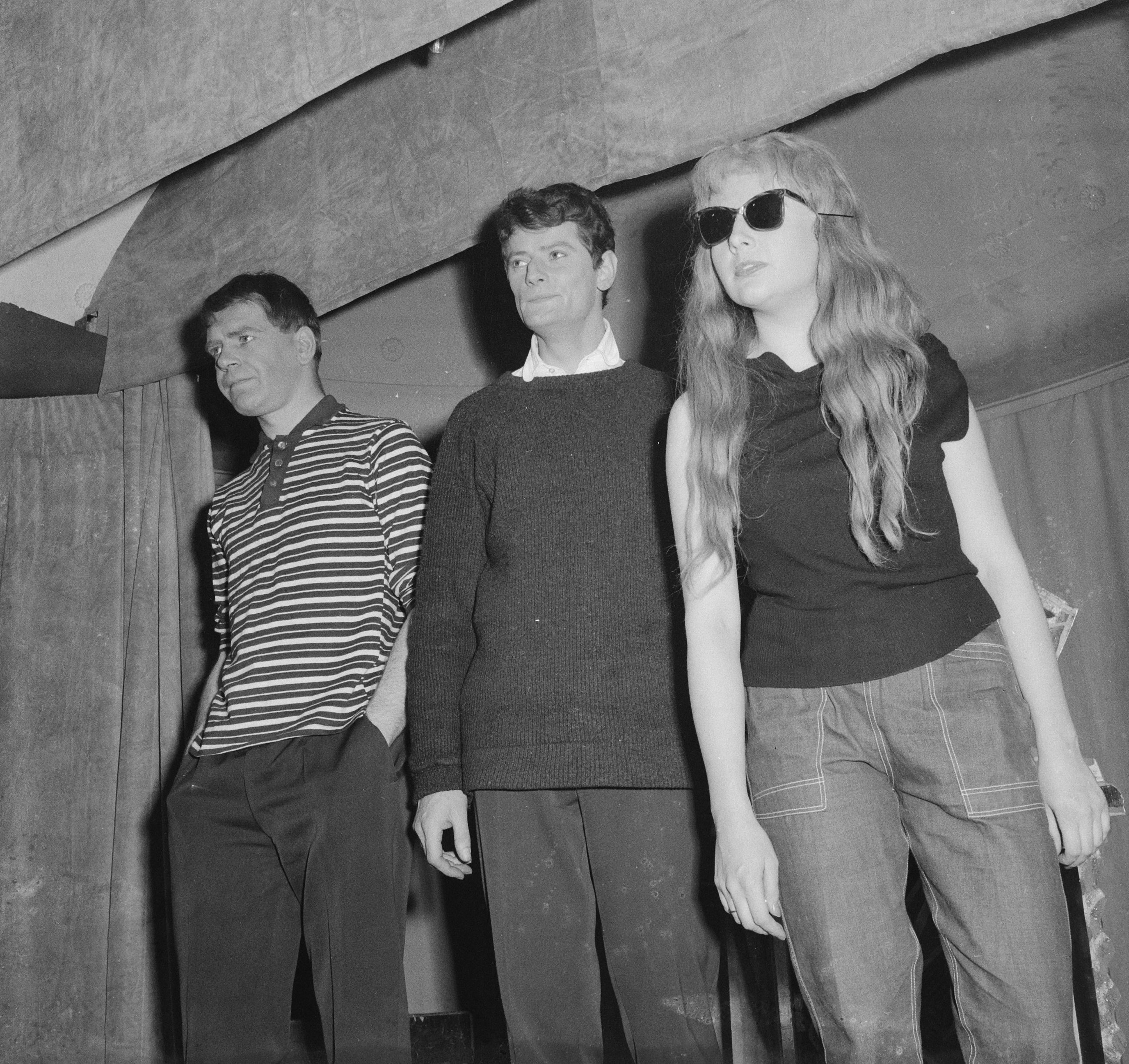 TV Leidsepleincabaret "Alle gekken kijken" , v.r.n.l. Marjan Berk, Aart Brouwer en Jaap van de Merwe Datum 15 december 1959